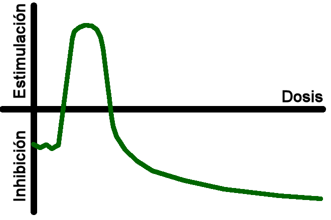 Gráfico de Dosis/respuesta para el concepto de hormesis.